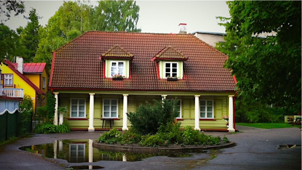 Bööckenhofi suvemõisa peahoone